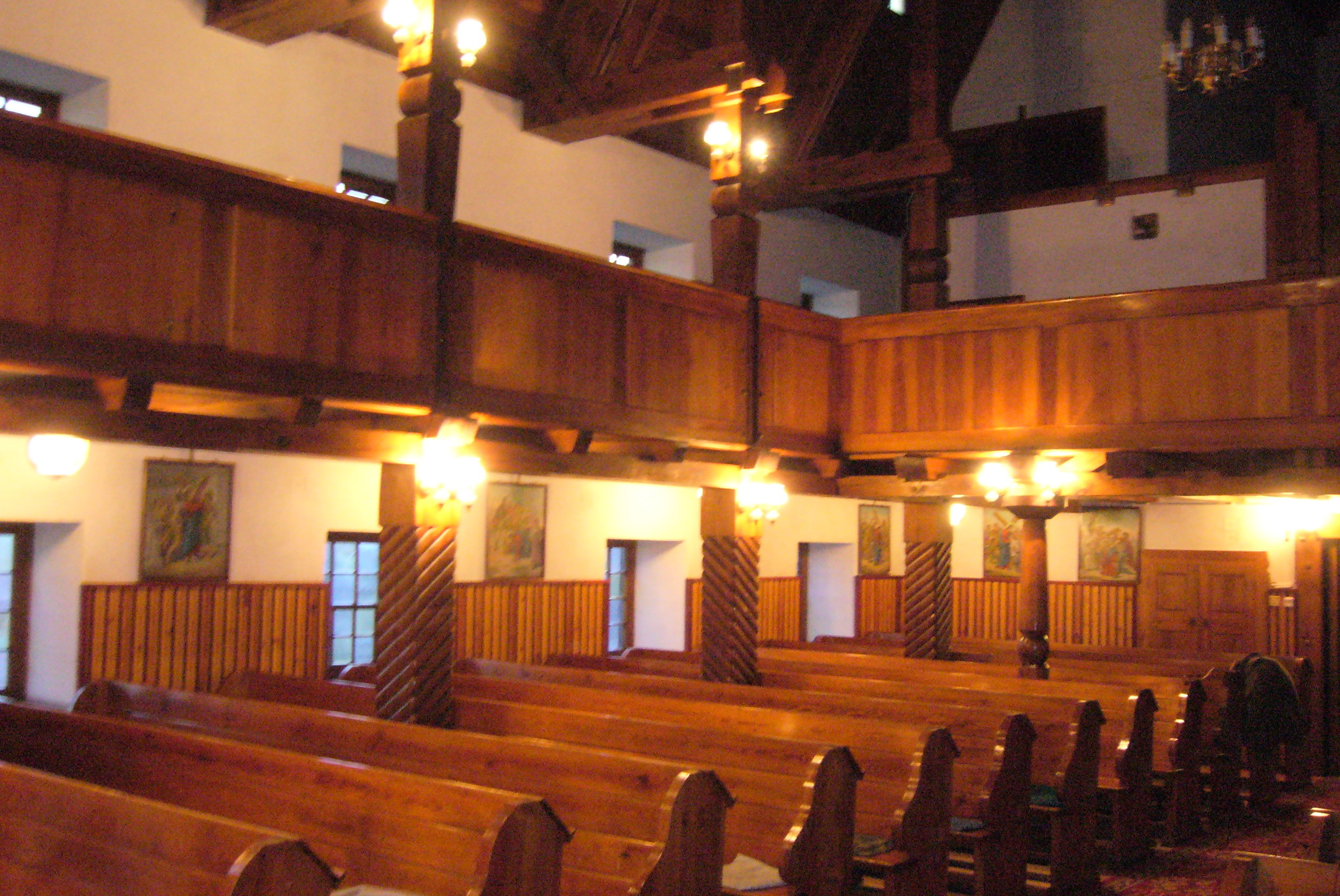 Wnętrze kościoła św. Antoniego w Starym Łomie, powiat legnicki